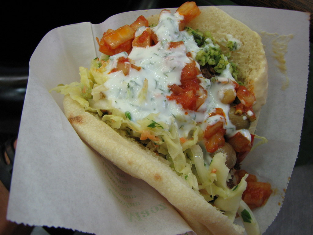 esto comí ese día... Maoz Vegetariano con Falafel... buenísimo! el Falafel son como unas albóndigas vegetarianas... y bueno, podías comer todo lo que quisieras, así es que aprovechaba, jajajaa